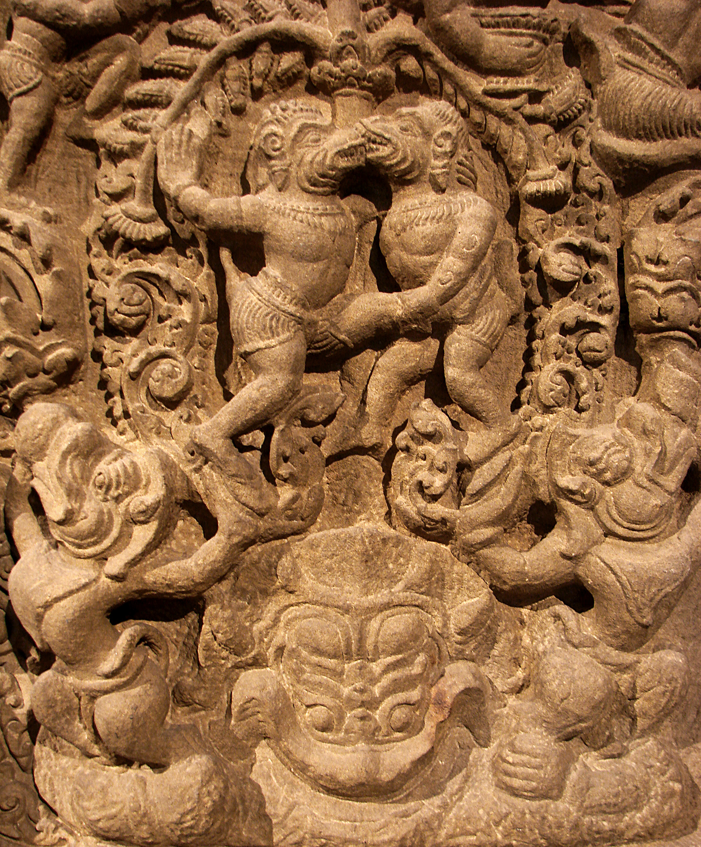 Linteau représentant un épisode du Ramayana: ici, le combat des singes Valin et Sugriva. Cambodge, province de Battambang, Vat Baset, style du Baphuon, 11ème siècle. Grès.Musée Guimet, Paris.